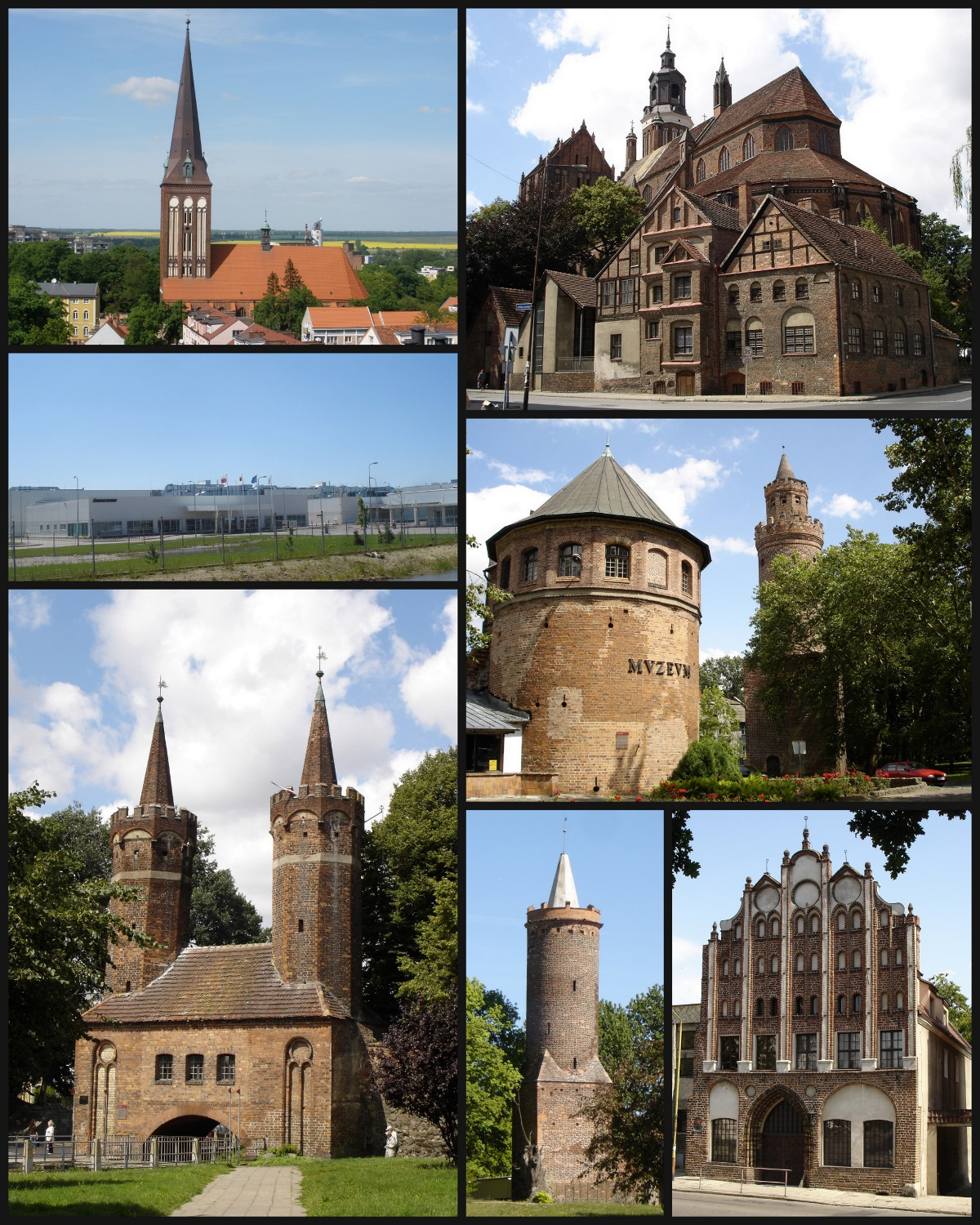 Joanniskirche, Marienkirche, Bridgestone Fabrik, Bastei und Eis Turm, Mühlentor, Weisskopf Turm, Protzen Haus